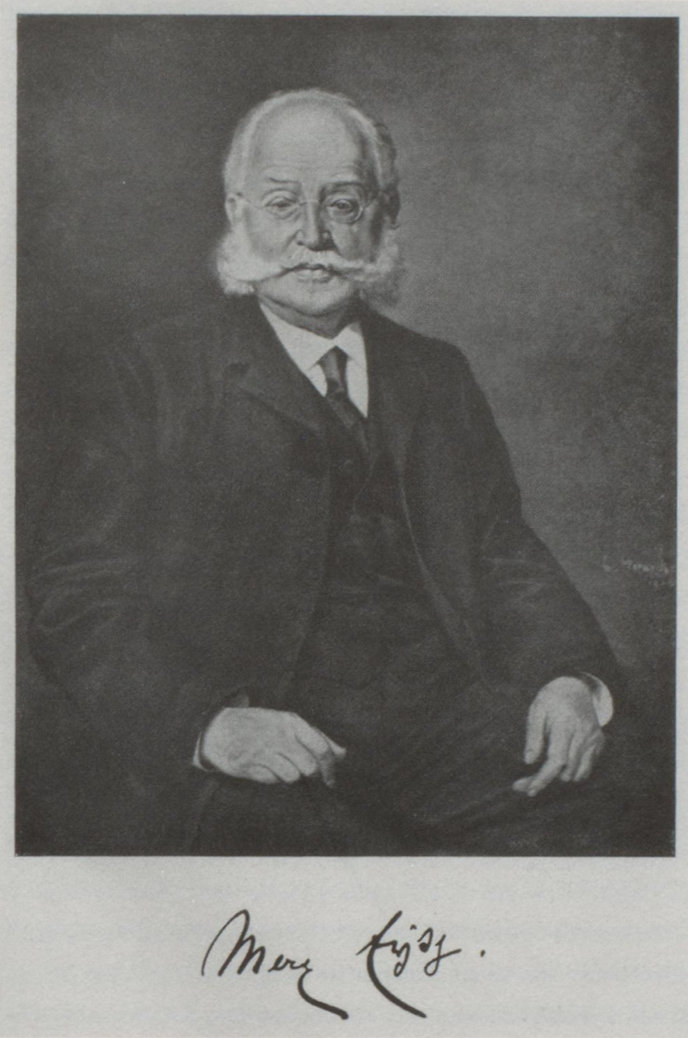 Max Eyth, signierte Photogravüre von Friedrich Bruckmann nach einem Ölgemälde von Léon Hornecker, 1906.